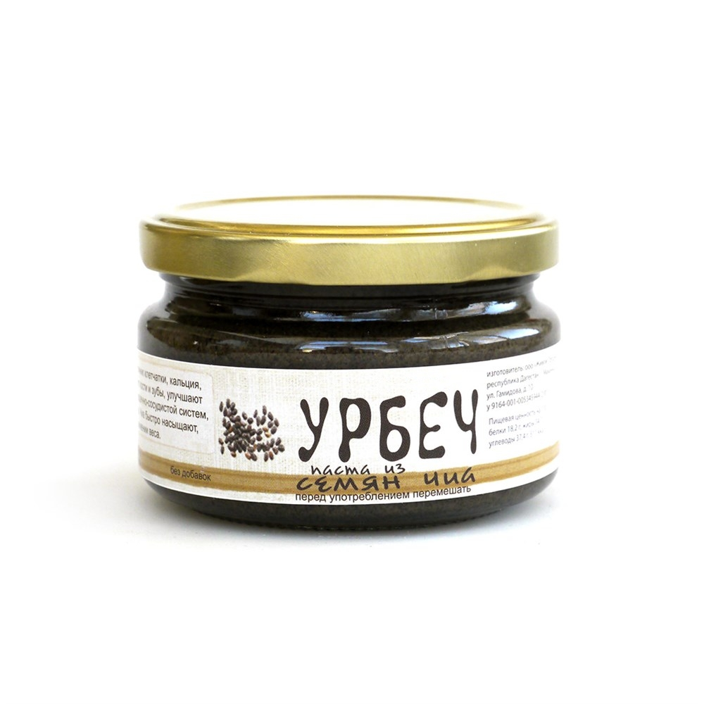 фотография урбеча